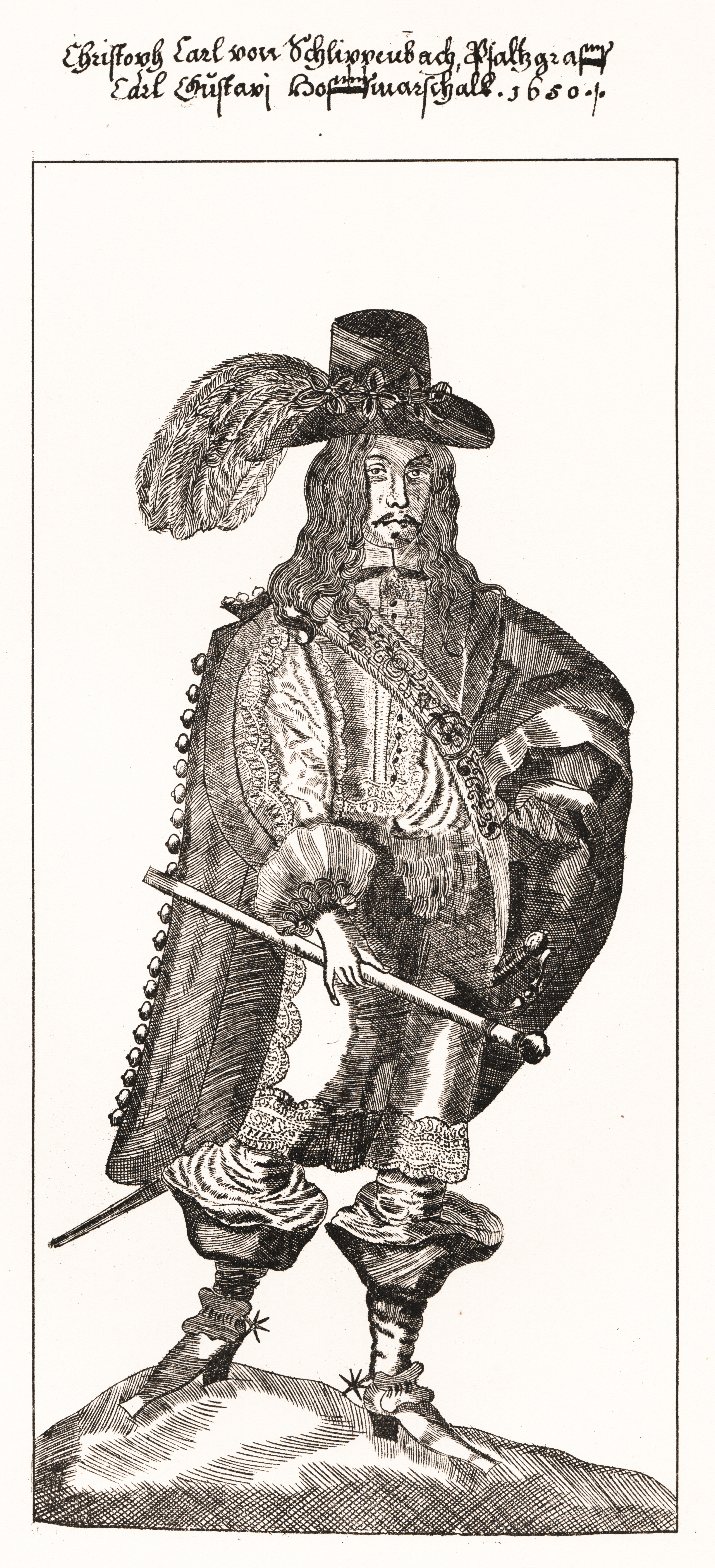 Christoph Karl von Schlippenbach (1624-1660). Denna underhaltiga gravyr är en reproduktion af en förgrundsfigur å den stora planche, som framställer pfalzgrefven Carl (X) Gustafs festmåltid i Nürnberg 1649. Schlippenbach tjänstgjorde därvid såsom hofmarskalk och går främst i den procession, som intågar med anrättningarna.